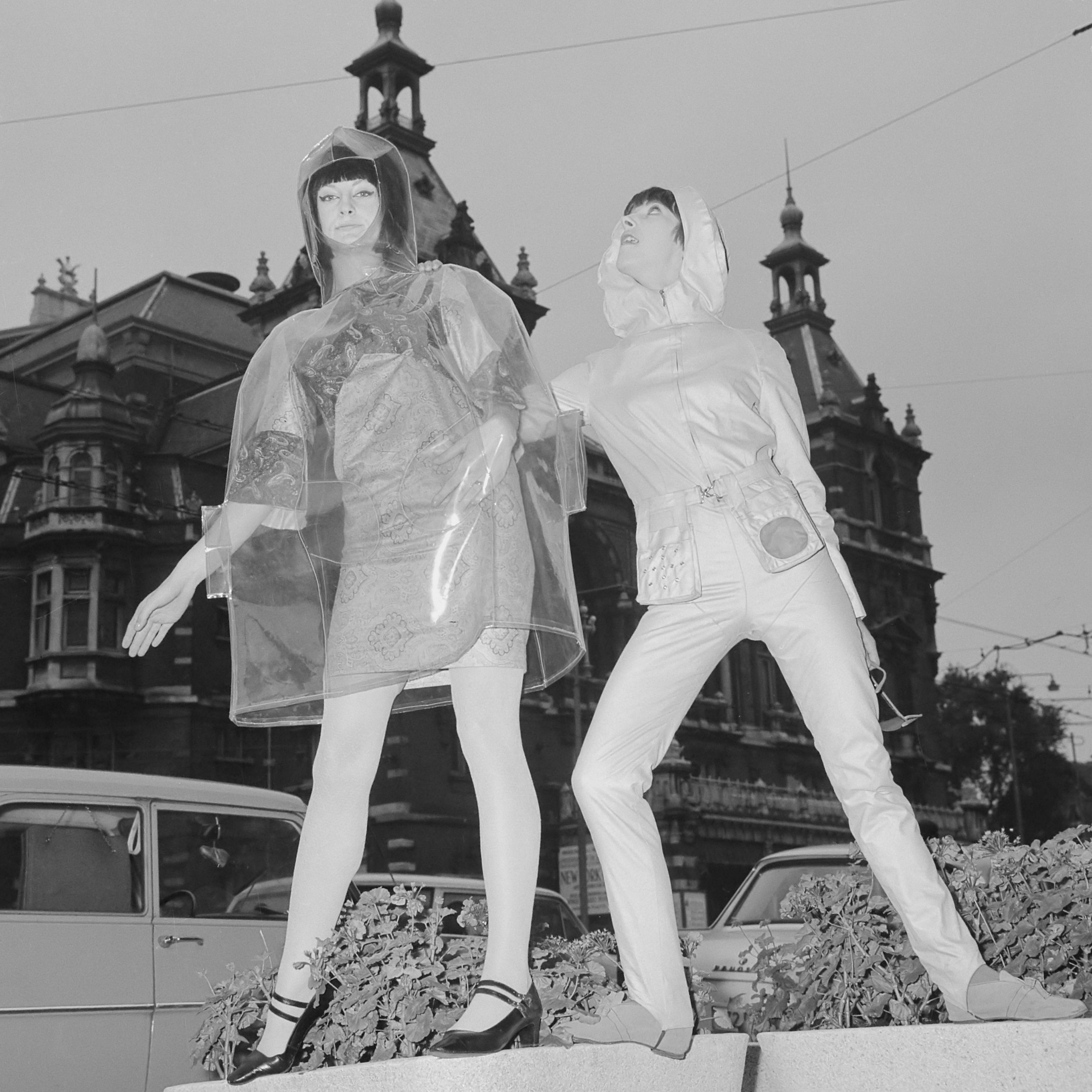 Josje Leger en Marijke Kooger showen de nieuwe Beat-Mode "Bewogen Mode" van plastic 23 augustus 1965